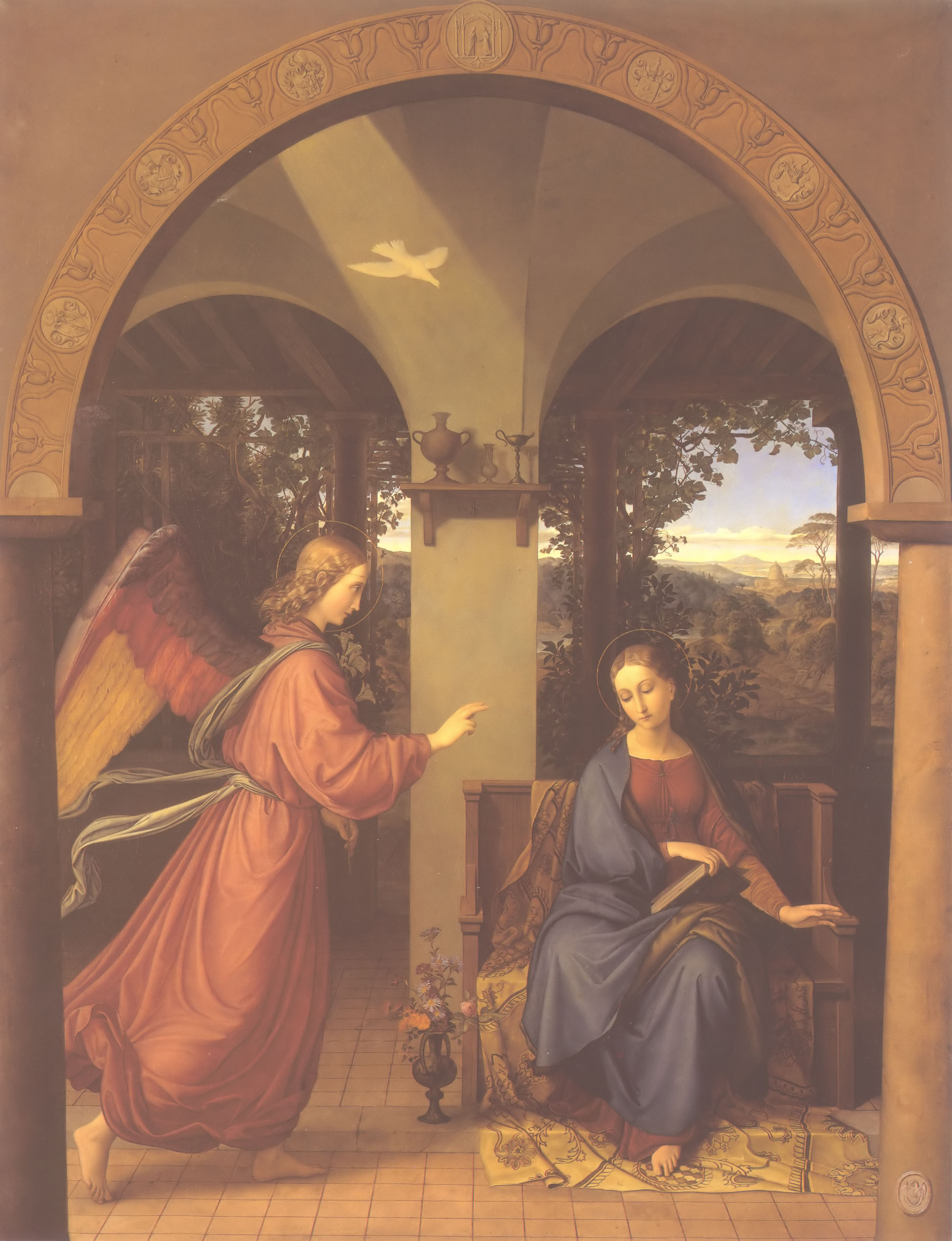 Verkündigung, Auftragsarbeit des Barons von Ampach, Domdechant des Stifts Wurzen, als Altarbild für den Dom St. Marien in Wurzen.